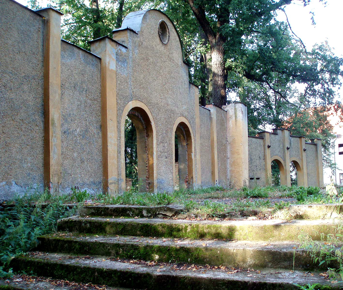 Přírodní divadlo v Kladrubech, okres Tachov.